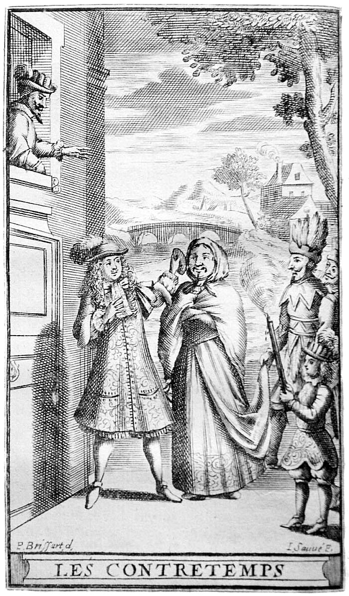 Illustration for "Les contretemps" (Molière).